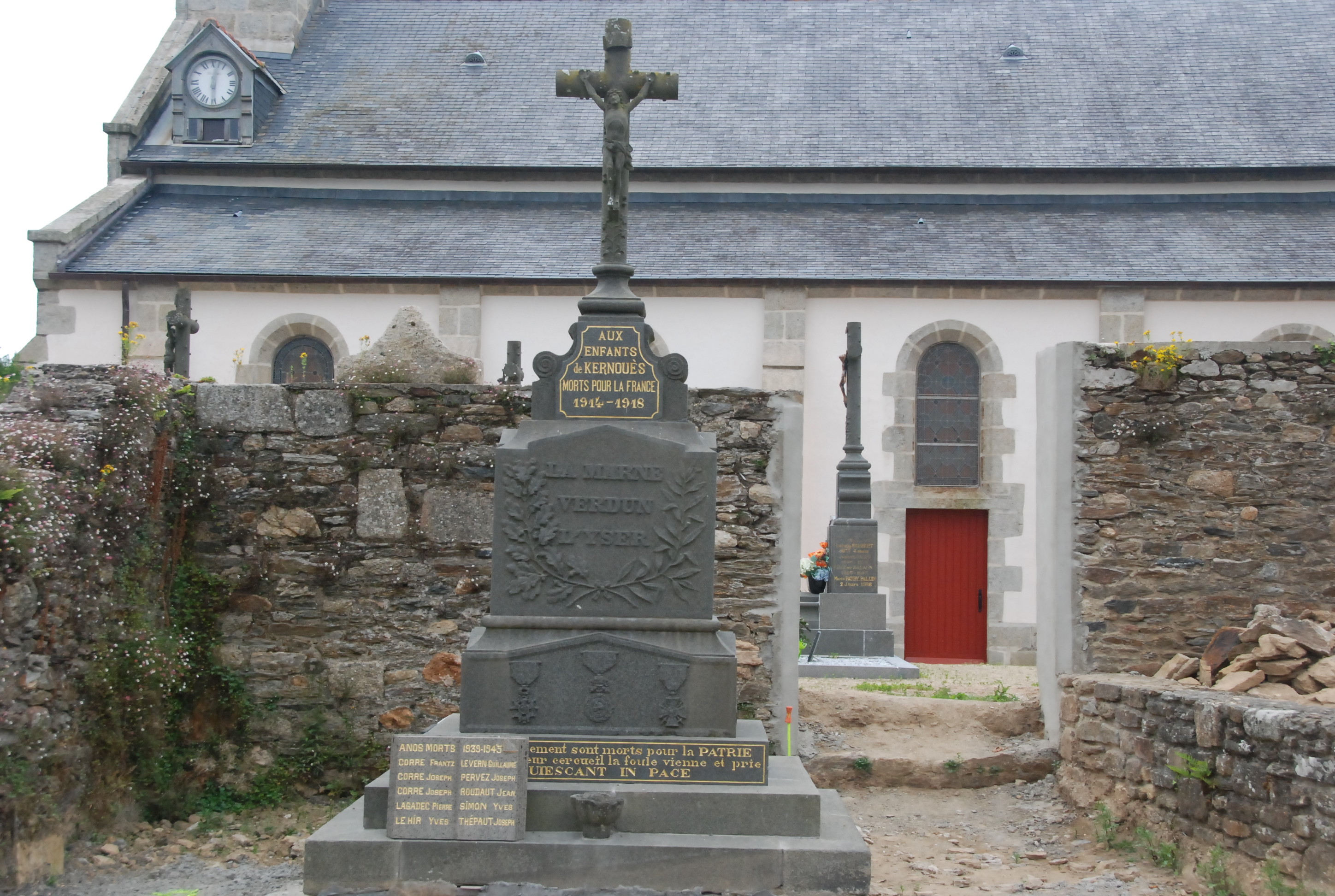 Monument aux morts - Kernoués-29